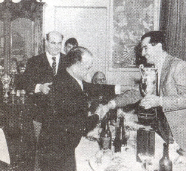 Ilario e Lorenzo Bandini (non parenti) a Forlì,1964 tratta da Libro: Bandini (storia della vita e automobili di Ilario Bandini)